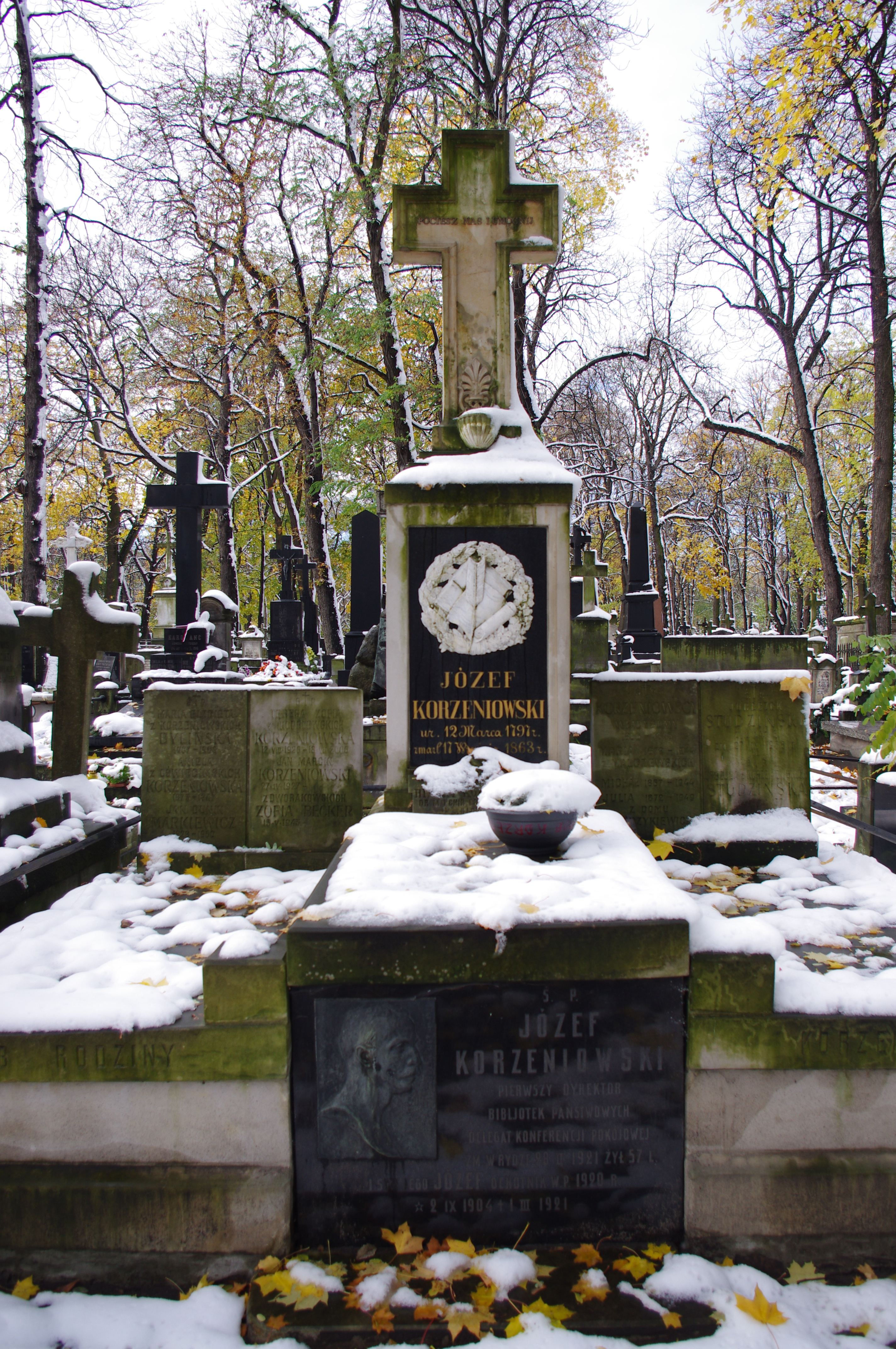 Grób pisarza Józefa Korzeniowskiego na Starych Powązkach w Warszawie